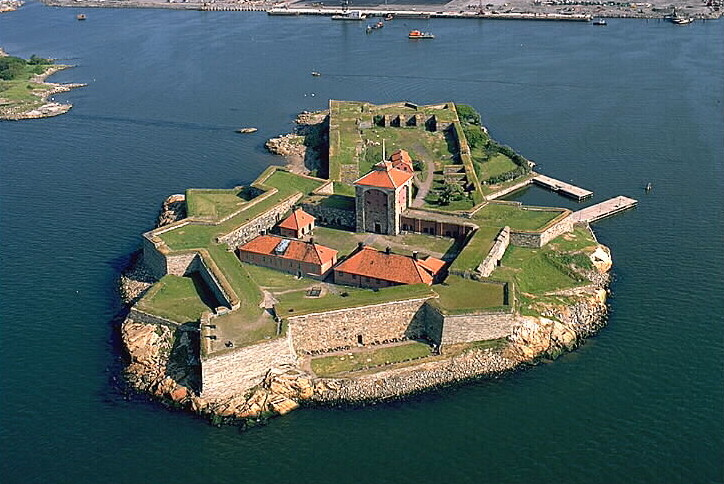 Flygbild över Nya Älvsborg. Bilden troligen från slutet av 1970-talet. Motiv: Nya Älvsborg Nyckelord: Byggnadsminnen:Statl, Flygbilder, Riksintressen Kategori: Kust- och skärgårdsmiljö, Fästning Flygbild över Nya Älvsborg. Bilden troligen från slutet av 1970-talet.